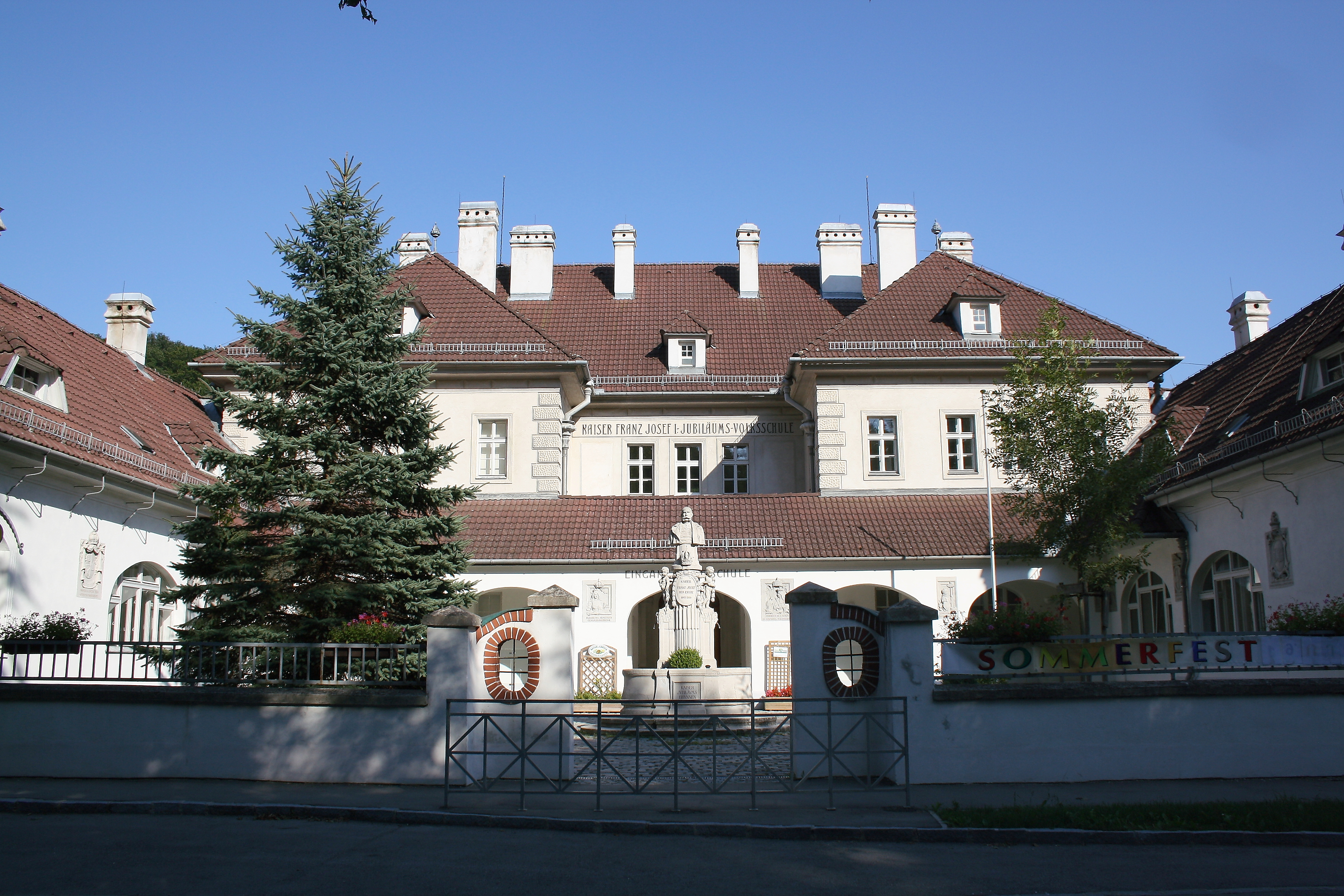 Die Kaiser-Franz-Josef I.-Jubiläumsvolksschule in Mauerbach, Niederösterreich. 1908 nach Plänen von Josef Hofbauer erbaut.